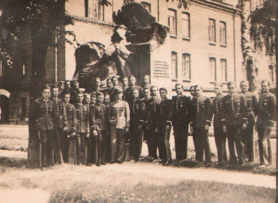 Podchorążowie Szkoły Podchorążych Piechoty w Komorowie k/Ostrowi Mazowieckiej, rocznik promowany w 1933 własność W. K Autor scan Kerim44